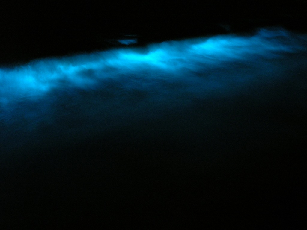 Bioluminescence